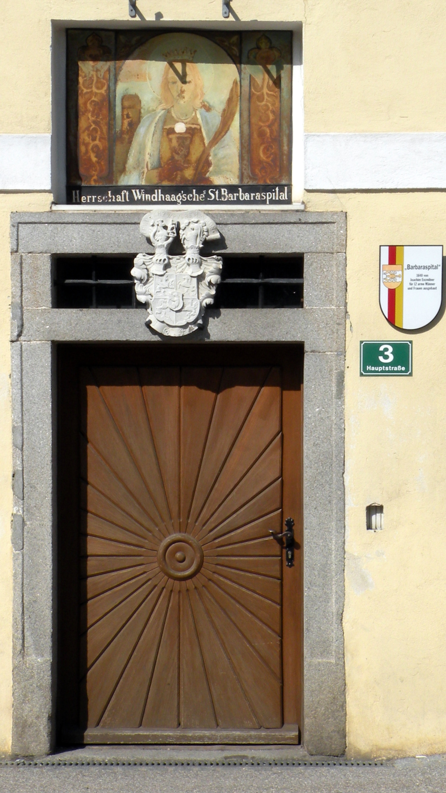 Portal des Sankt Barbara Spitals in der Marktgemeinde Münzbach im Bezirk Perg in Oberösterreich, mit Wappen der Herrschaft Windhaag